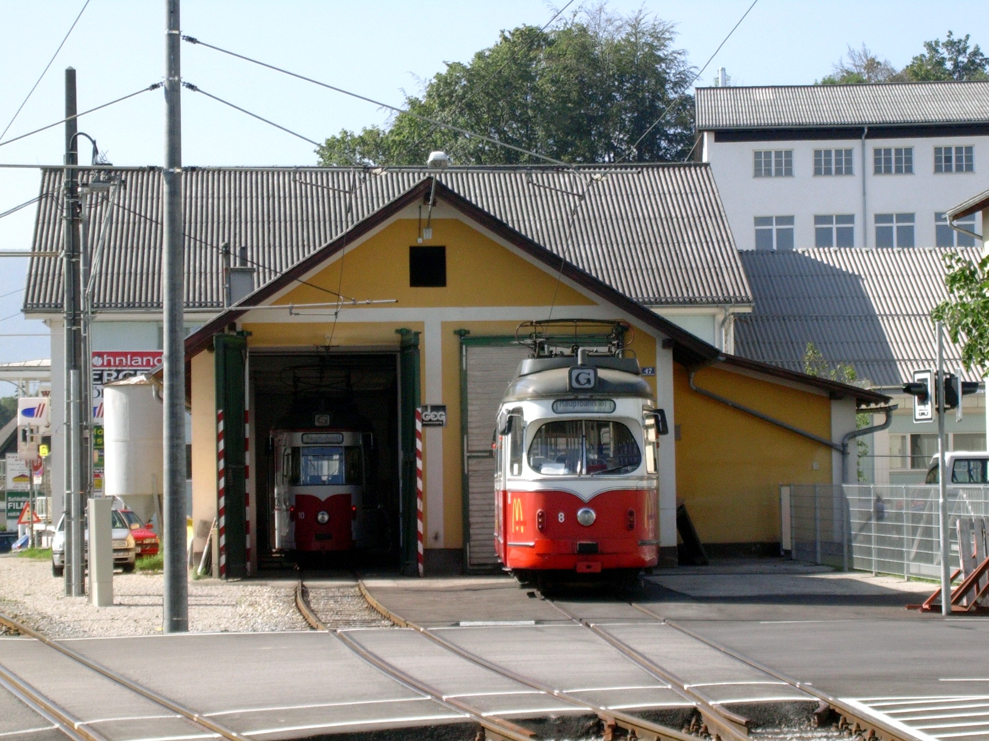 GM 8 vor der Remise